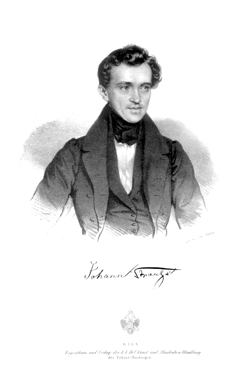 Johann Strauss Vater, Lithographie von Joseph Kriehuber, 1835.